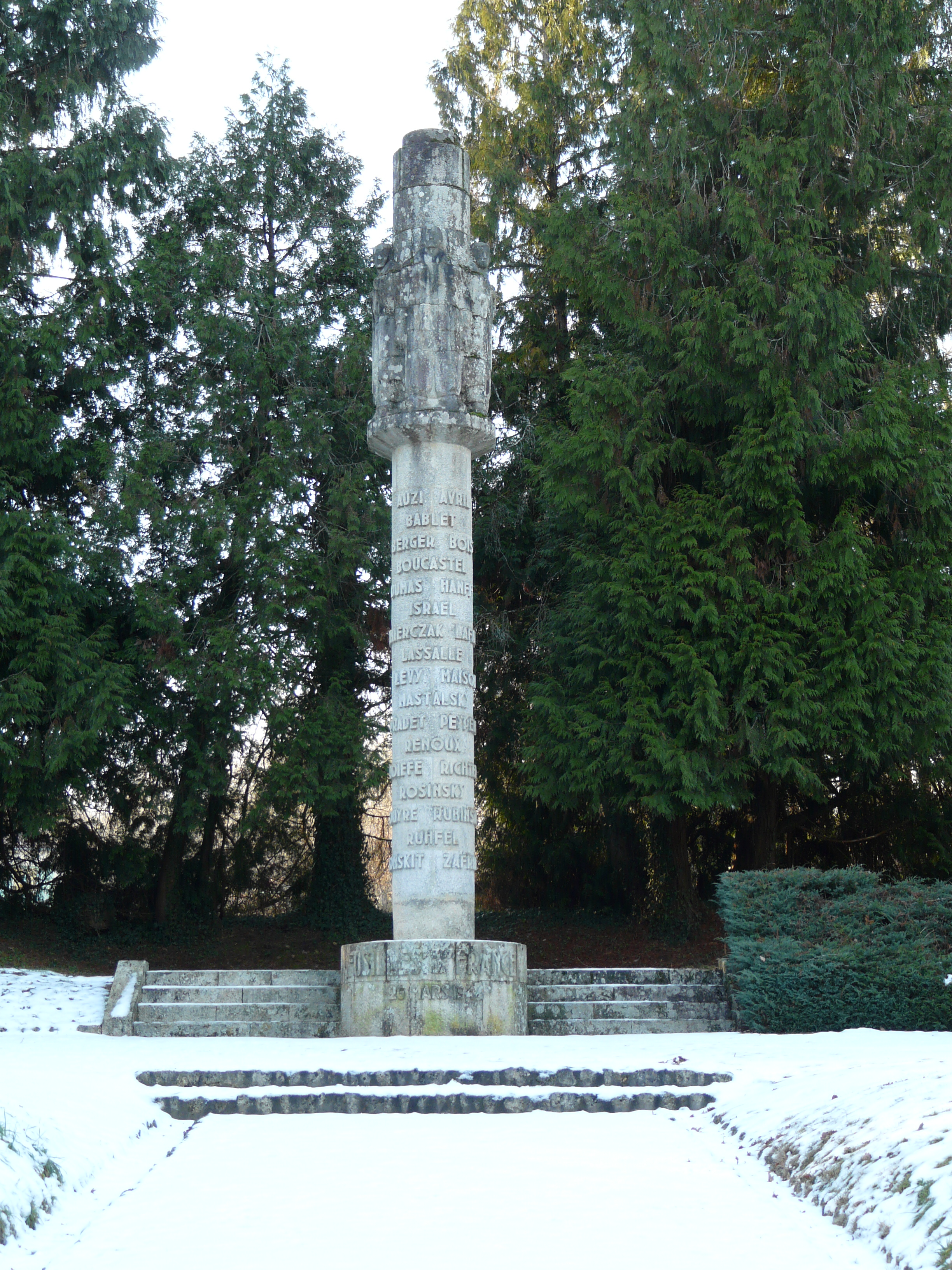 Stèle commémorative du 26 mars 1944, champ des martyrs, Brantôme, Dordogne, France